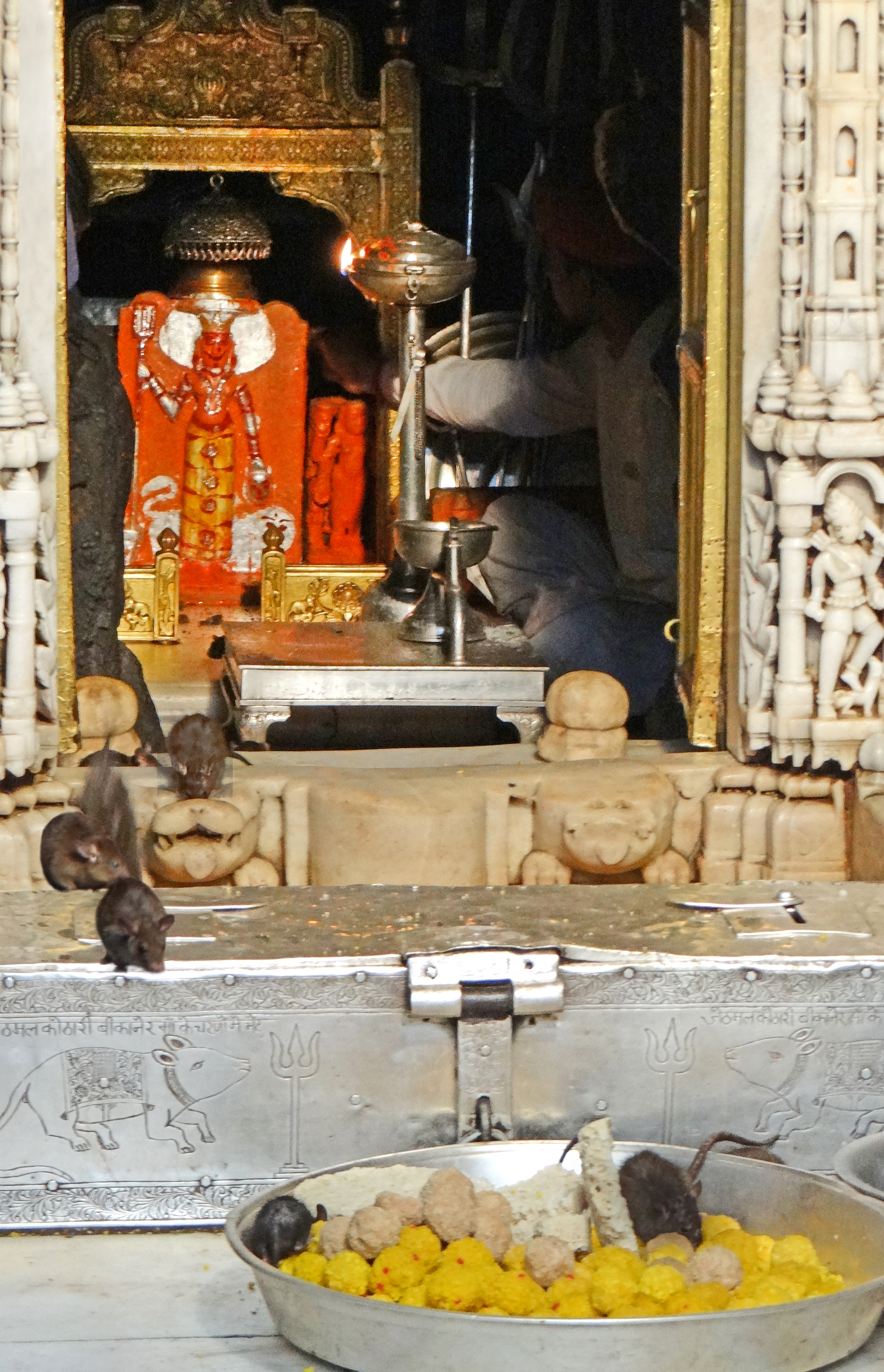 La statue de Karni Mata avec les rats La mystique Karni Mata est considérée par les dévots comme une incarnation de Durga. Elle vécut au XVème siècle. Le temple qui lui est consacré est situé à Deshnoke (village à 33 km de Bikaner). Il est peuplé de rats sacrés qui sont en liberté et circulent entre les jambes des visiteurs. Les bâtiments du temple datent du XVIIème siècle (époque de Ganga Singh). La façade est en marbre blanc finement sculpté avec des portes et volets en argent massif enrichis de reliefs. Les rats seraient la réincarnation des membres de la caste des Charan, à laquelle appartenait Karni Mata. Article de Wikipedia sur Karni Mata